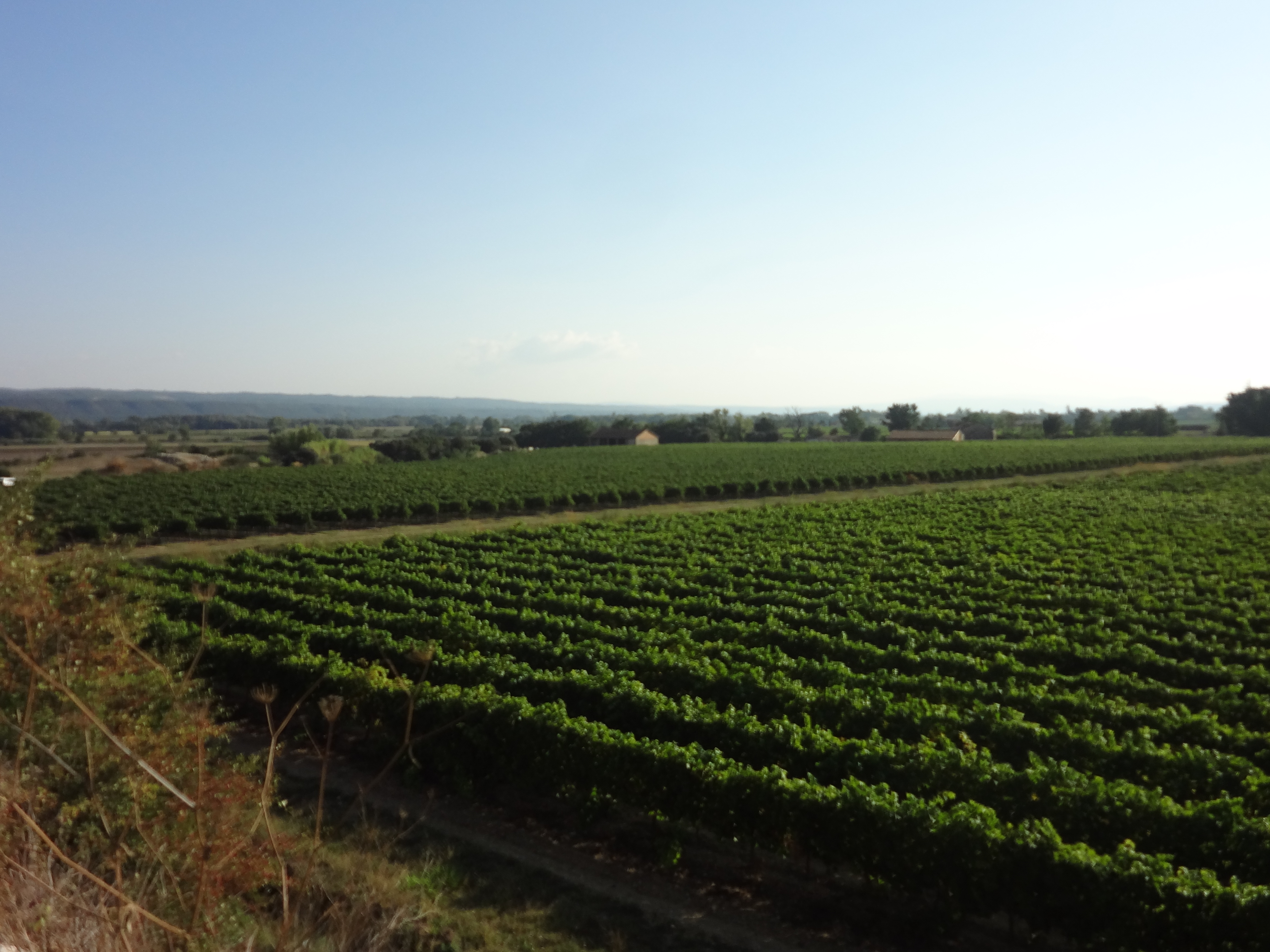 Vigne à Manosque, quartier des Quintrands